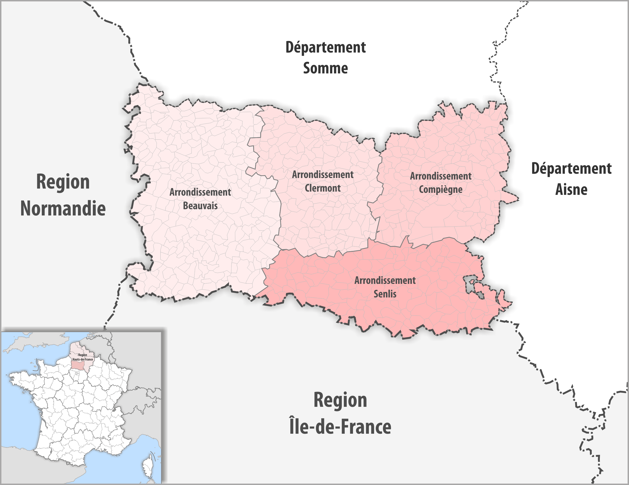 Gemeinden und Arrondissemente im Departement Oise